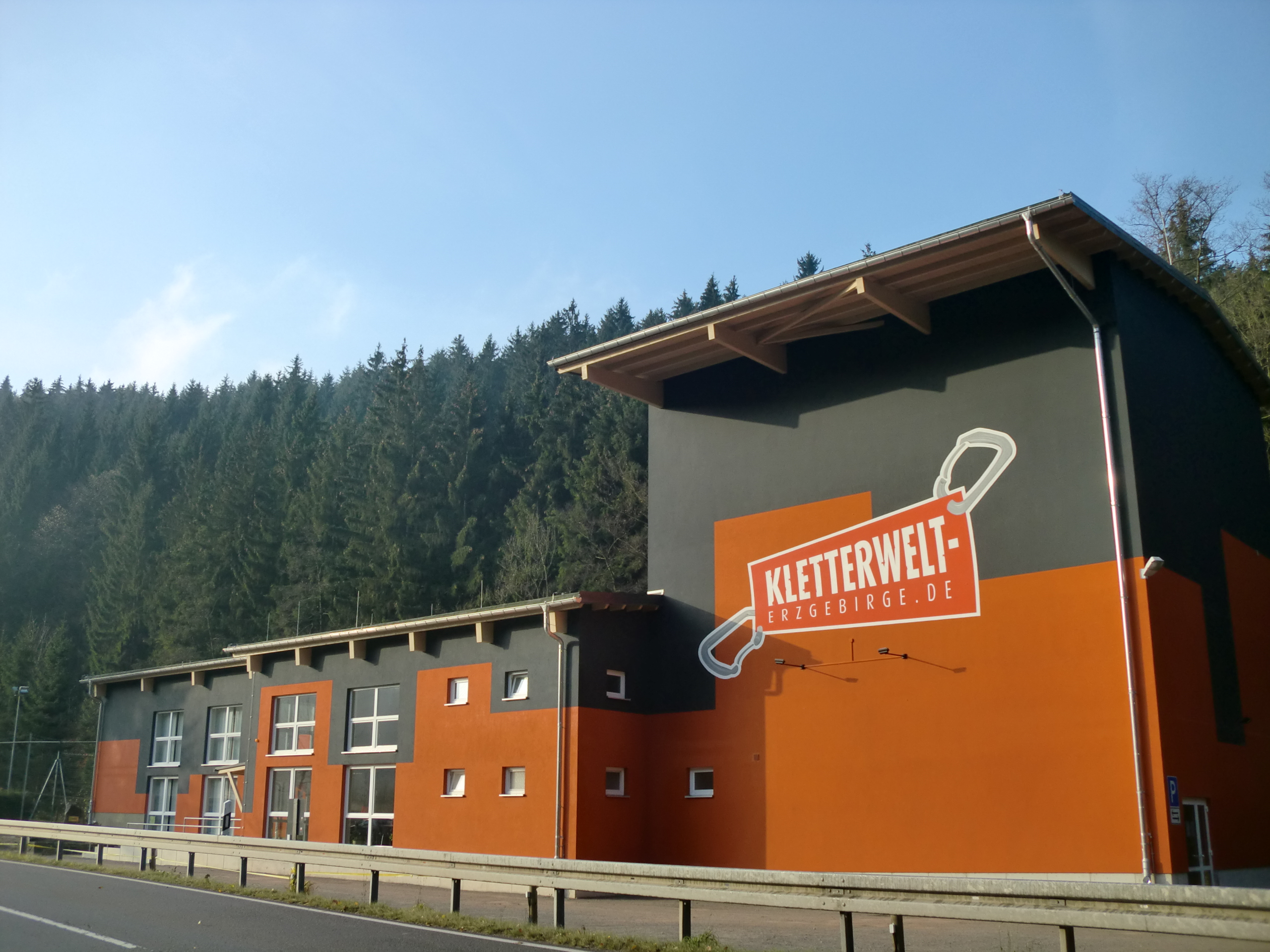 Kletterhalle neben der Strobelmühle von Osten